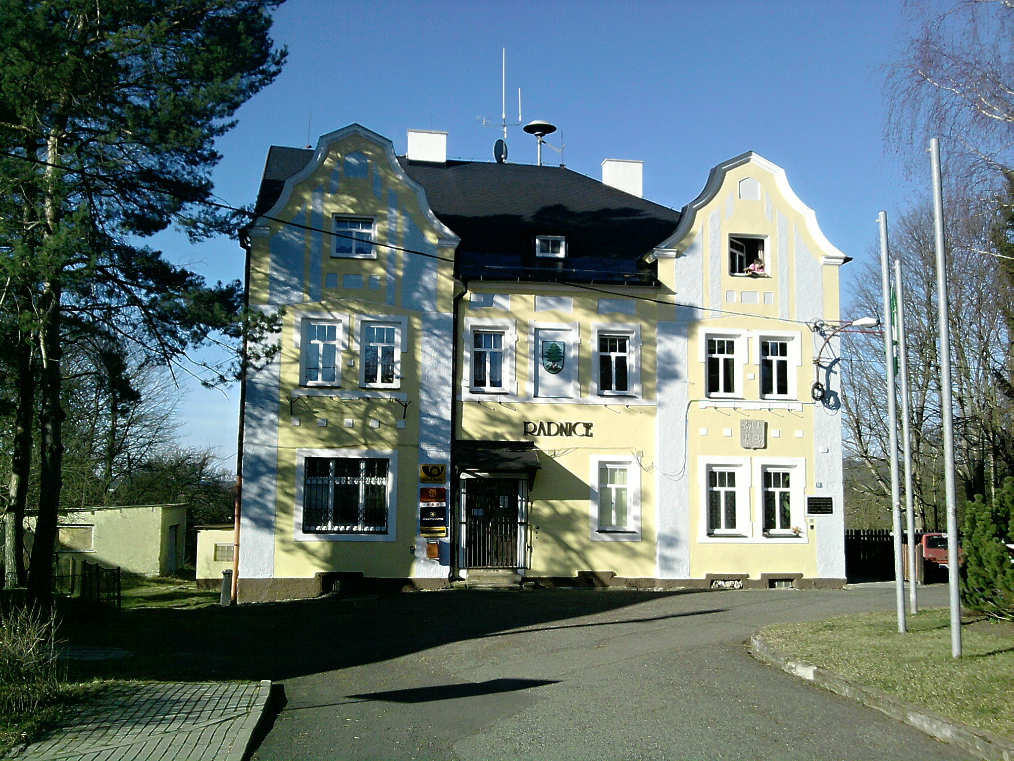 353 01 Tři Sekery, Czech Republic